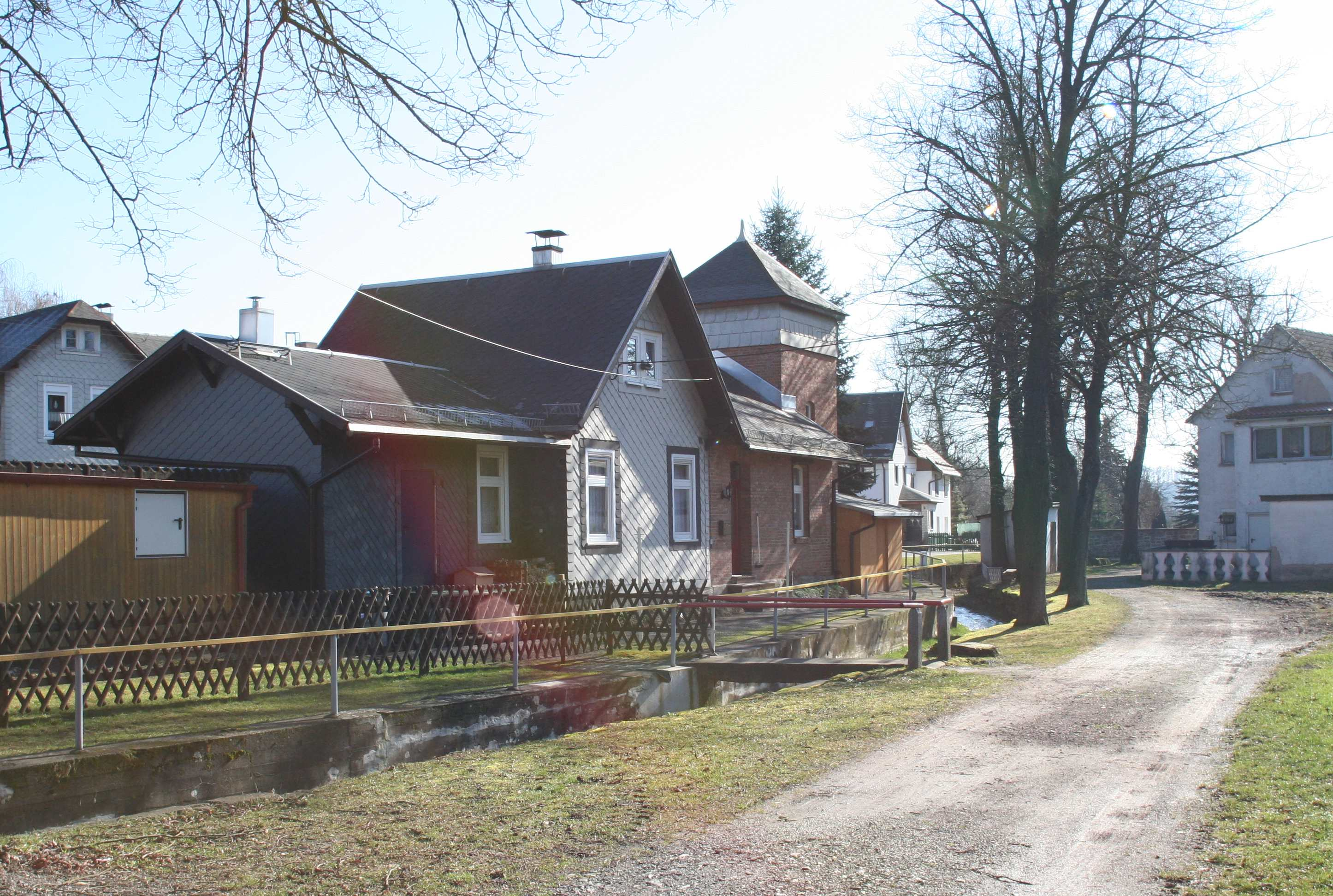 Ehemaliger Bahnhof Brattendorfs, Gemeinde Auengrund im Landkreis Hildburghausen